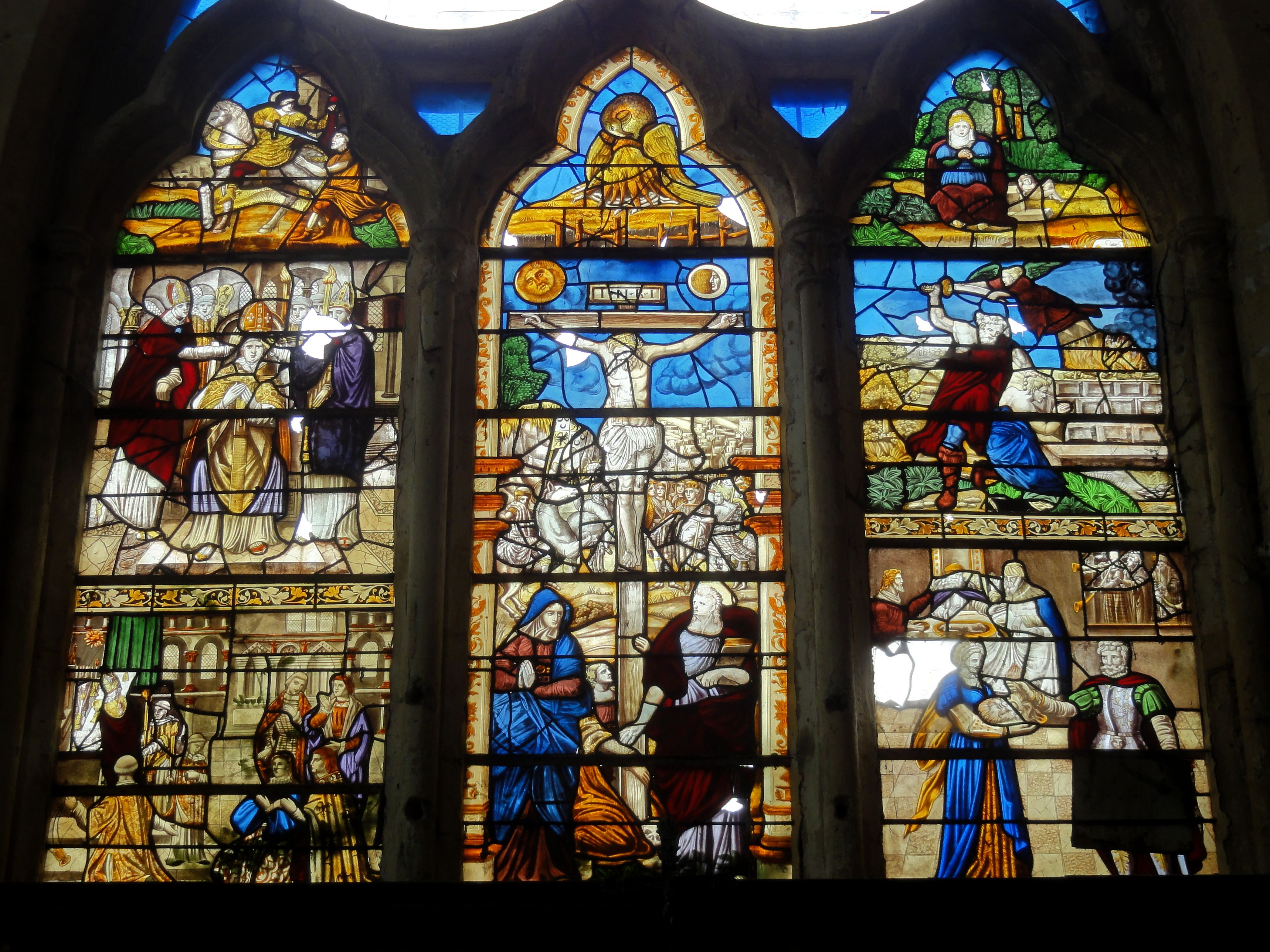 Baie du chevet, vitraux classés du XVIe siècle.